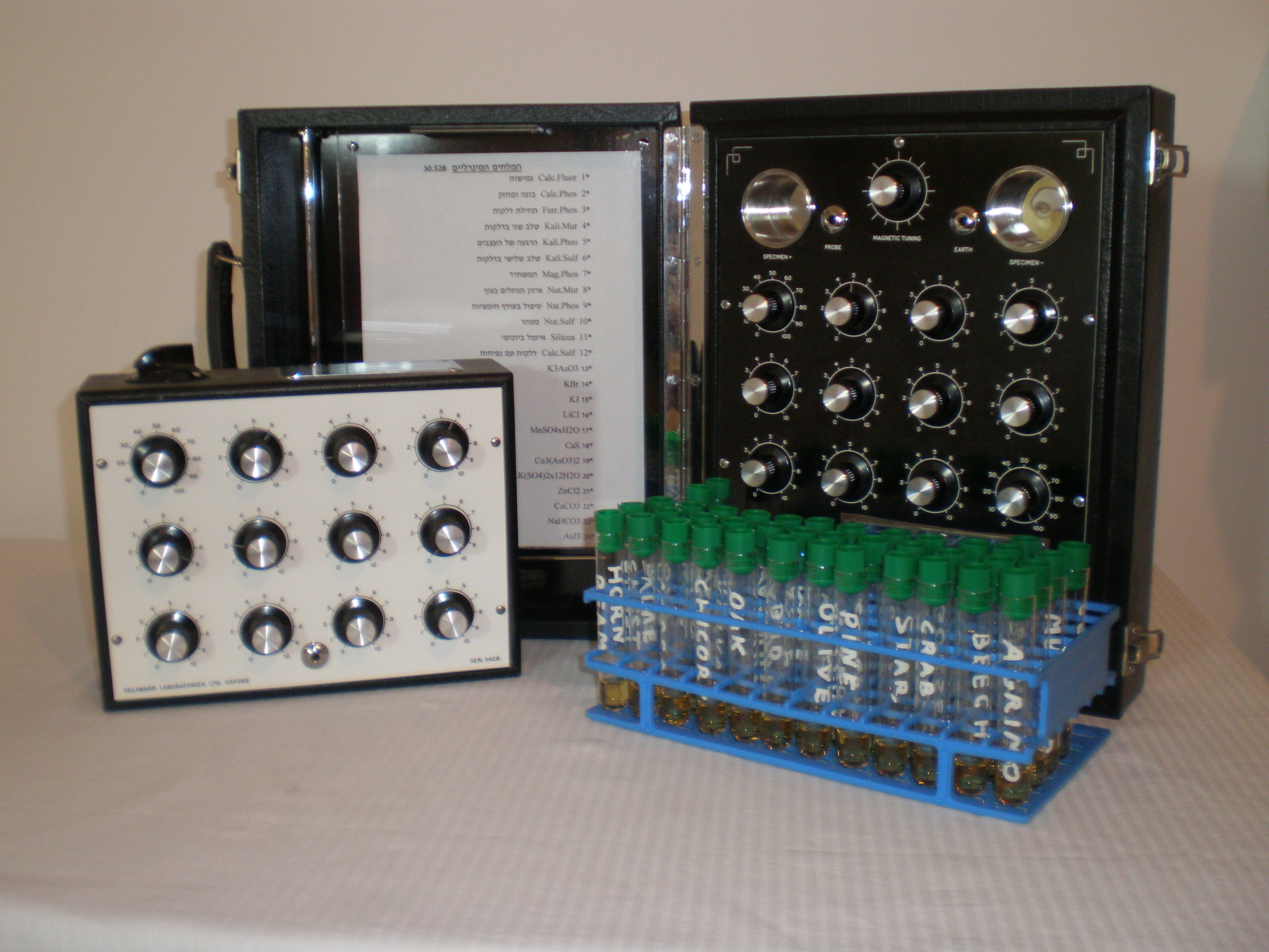 מכשירים רדיוניים לאבחון וטיפול, ייצורם המסחרי החל משנת 1935